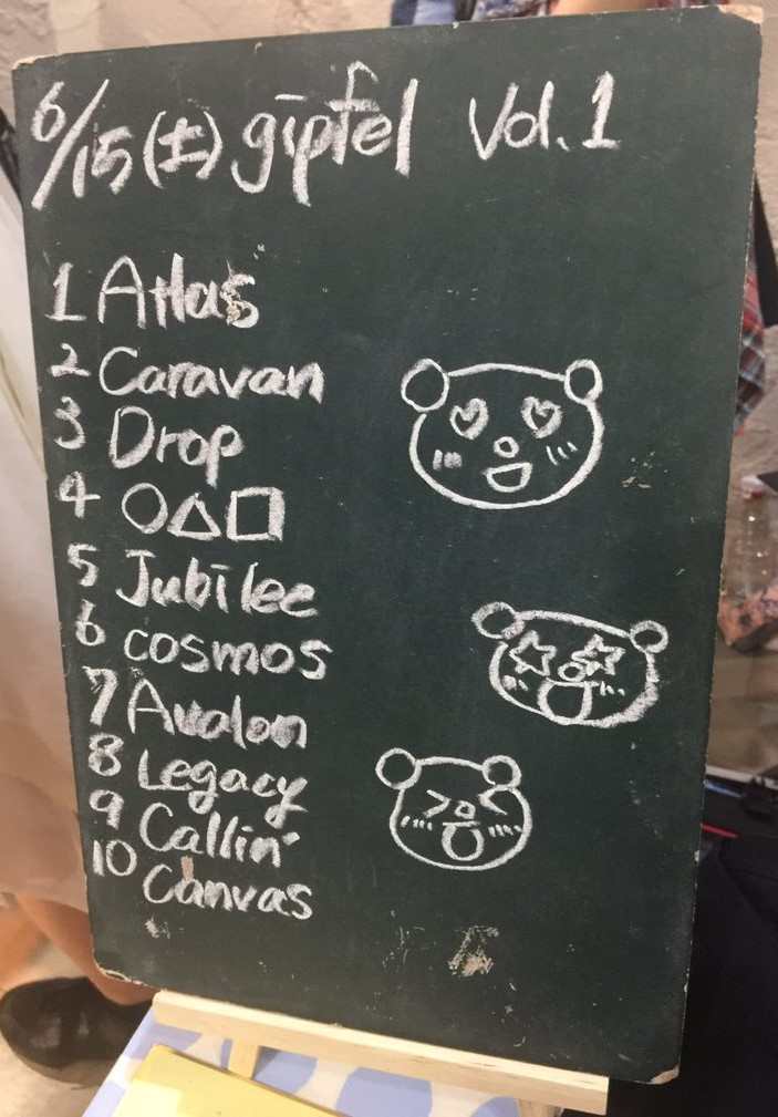 amiinAセトリボード